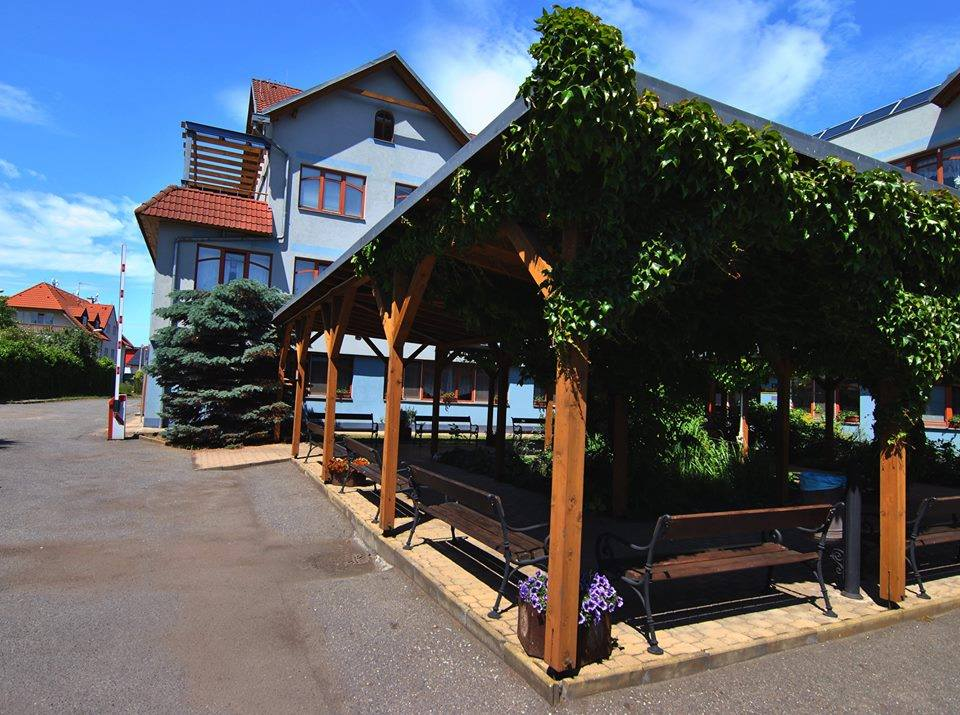 Průčelí budovy Domova pro seniory Hortenzie v obci Bořanovice (Praha-východ).